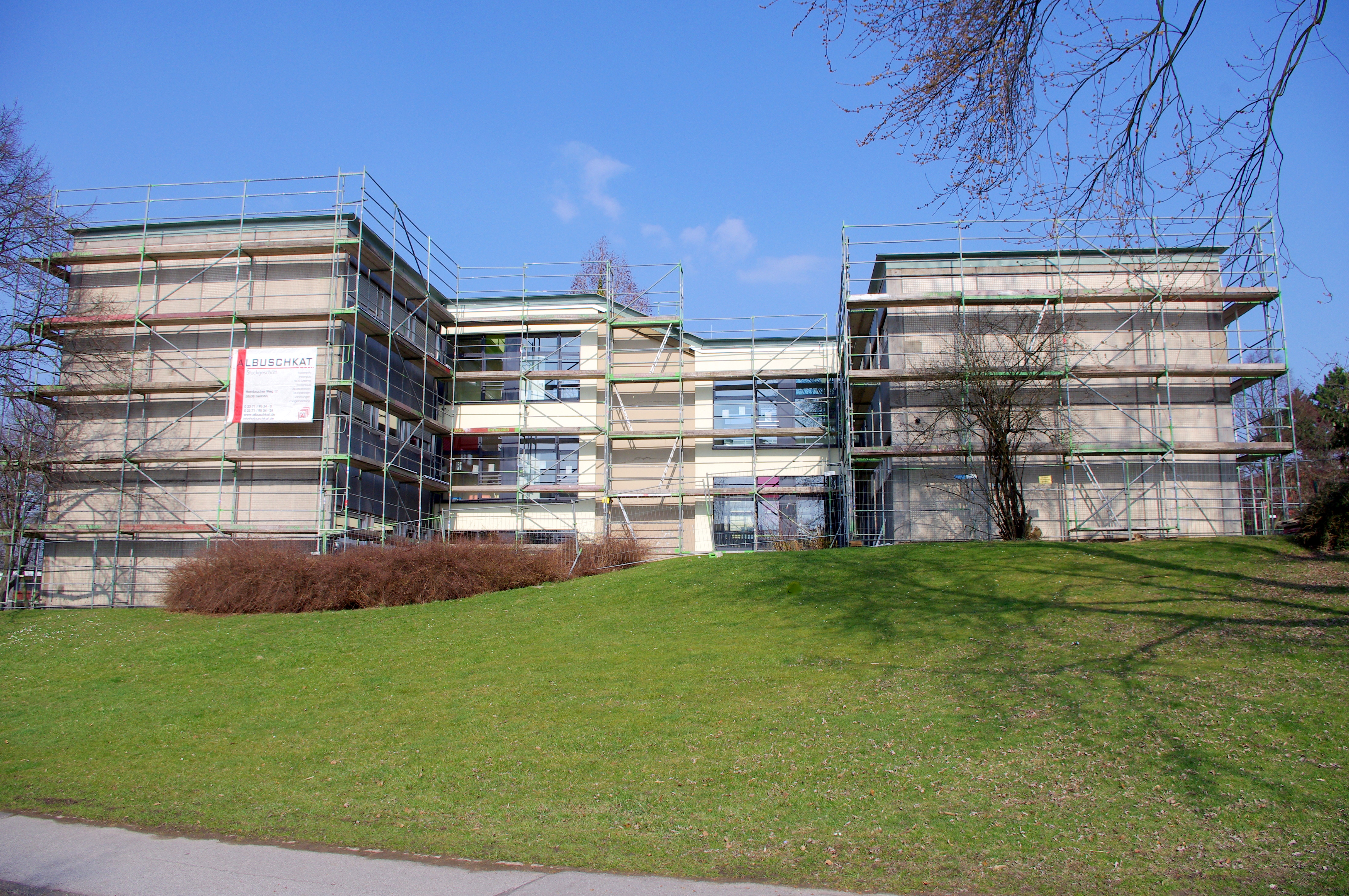 Rekonstruktionsarbeiten an der Grundschule Hohwart